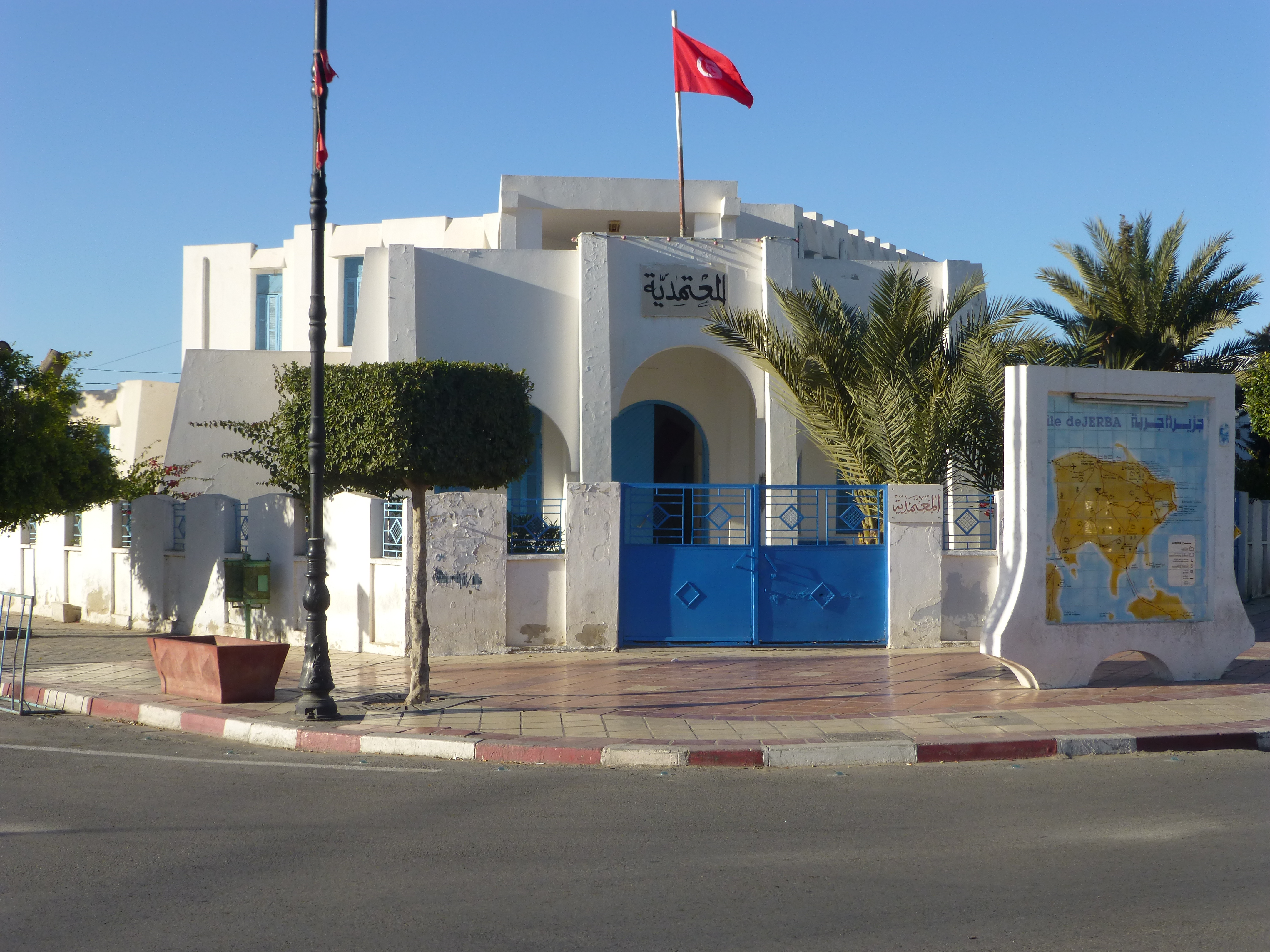 Délégation de Djerba-Midoun en décembre 2012